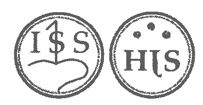 Siegel des Eigentümers und seines Pächters von Kenkhausen